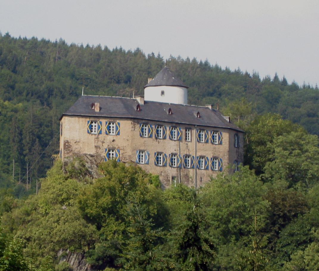 Castle Kreuzberg near Altenahr, Germany